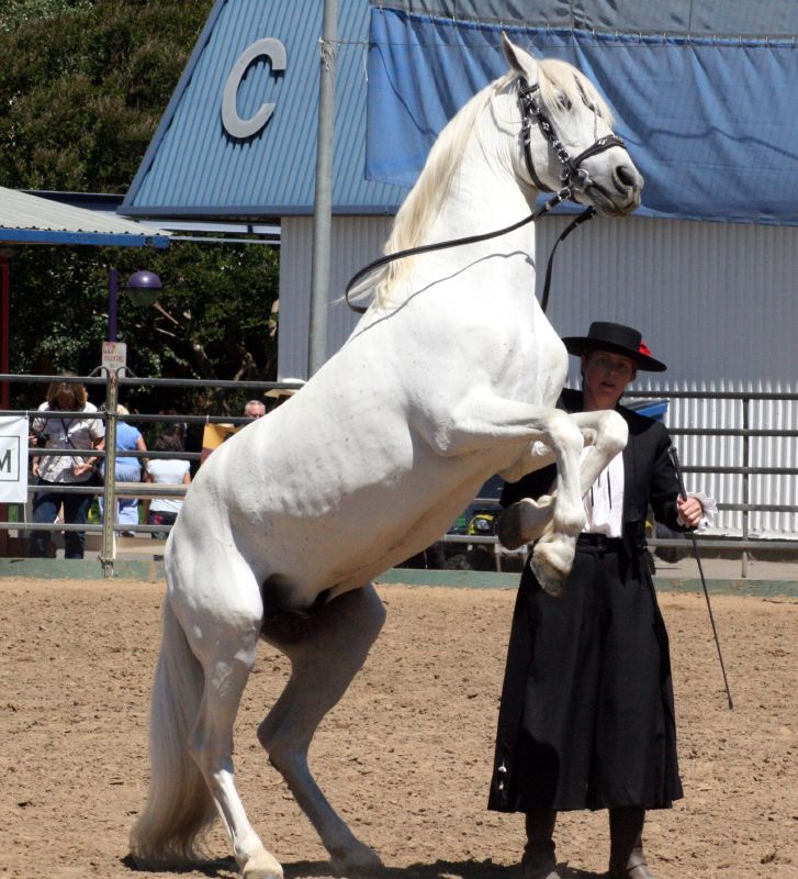 Andalusian